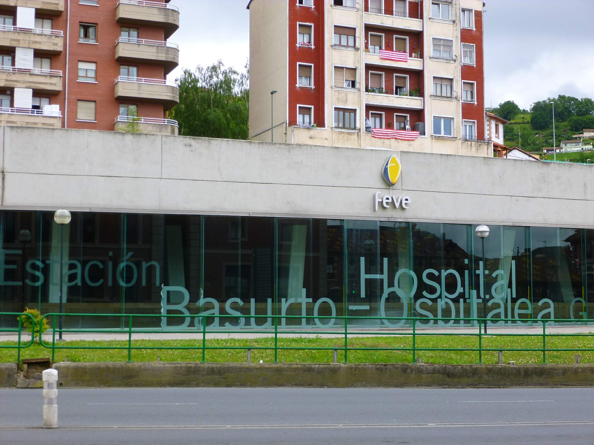 Estación de Basurto-Hospital, de FEVE (Bilbao)